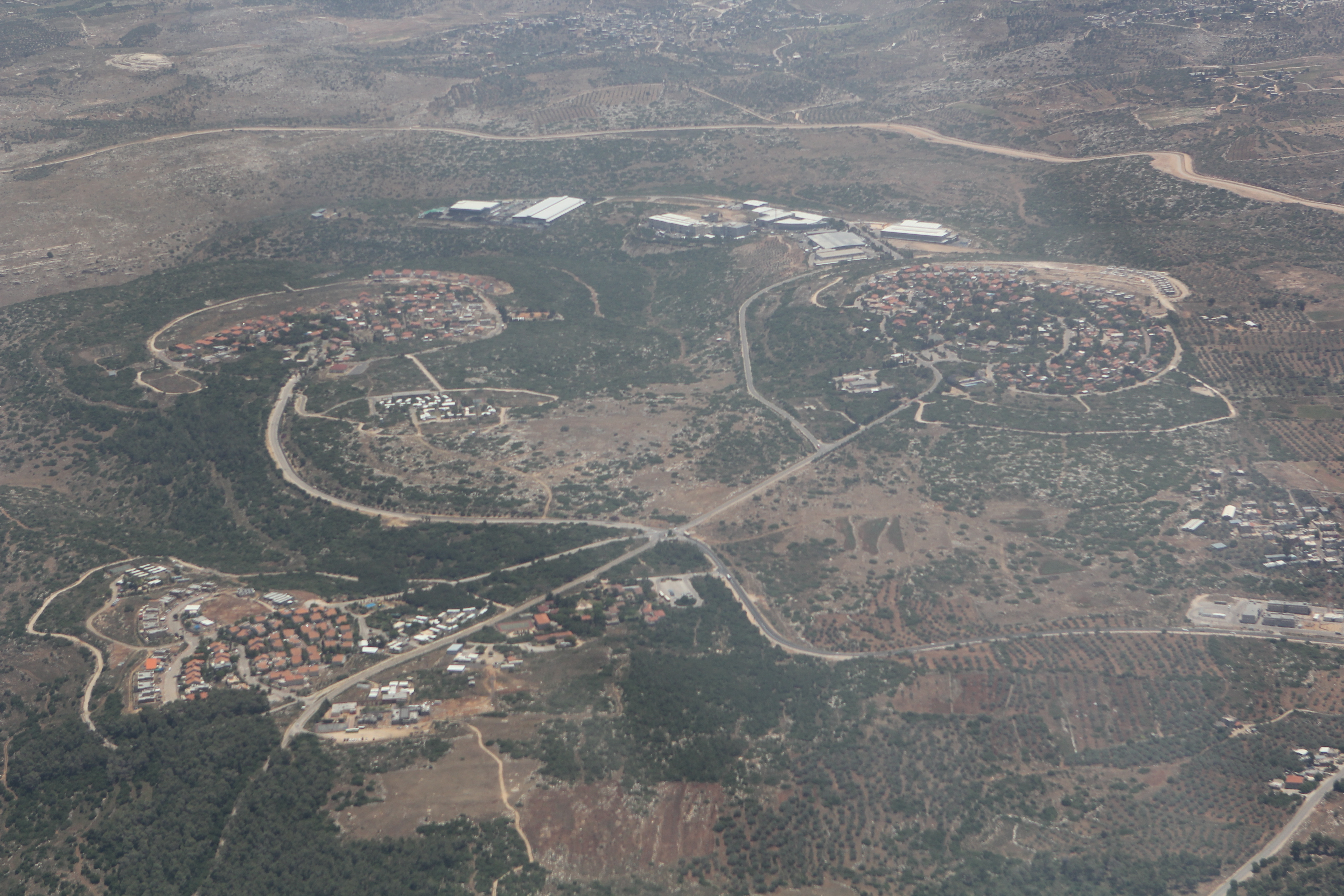 צילום אוויר של שקד, חיננית טל מנשה